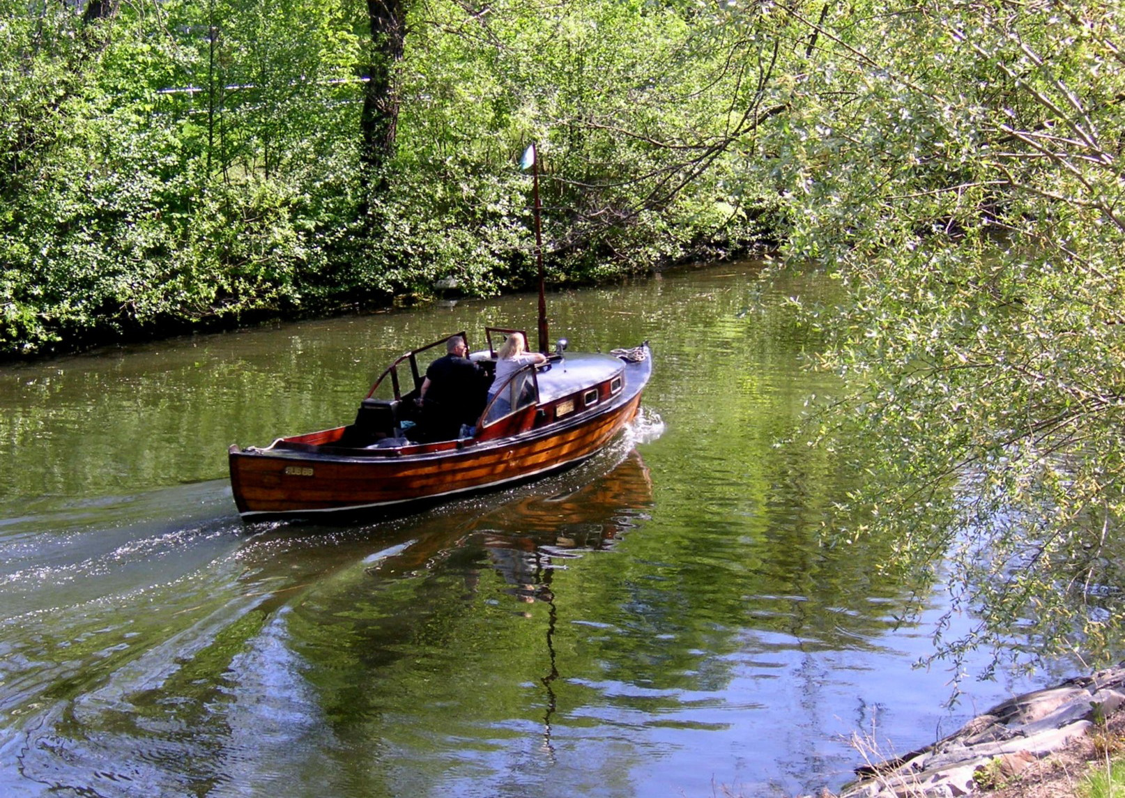 Karlbergskanalen i Stockholm